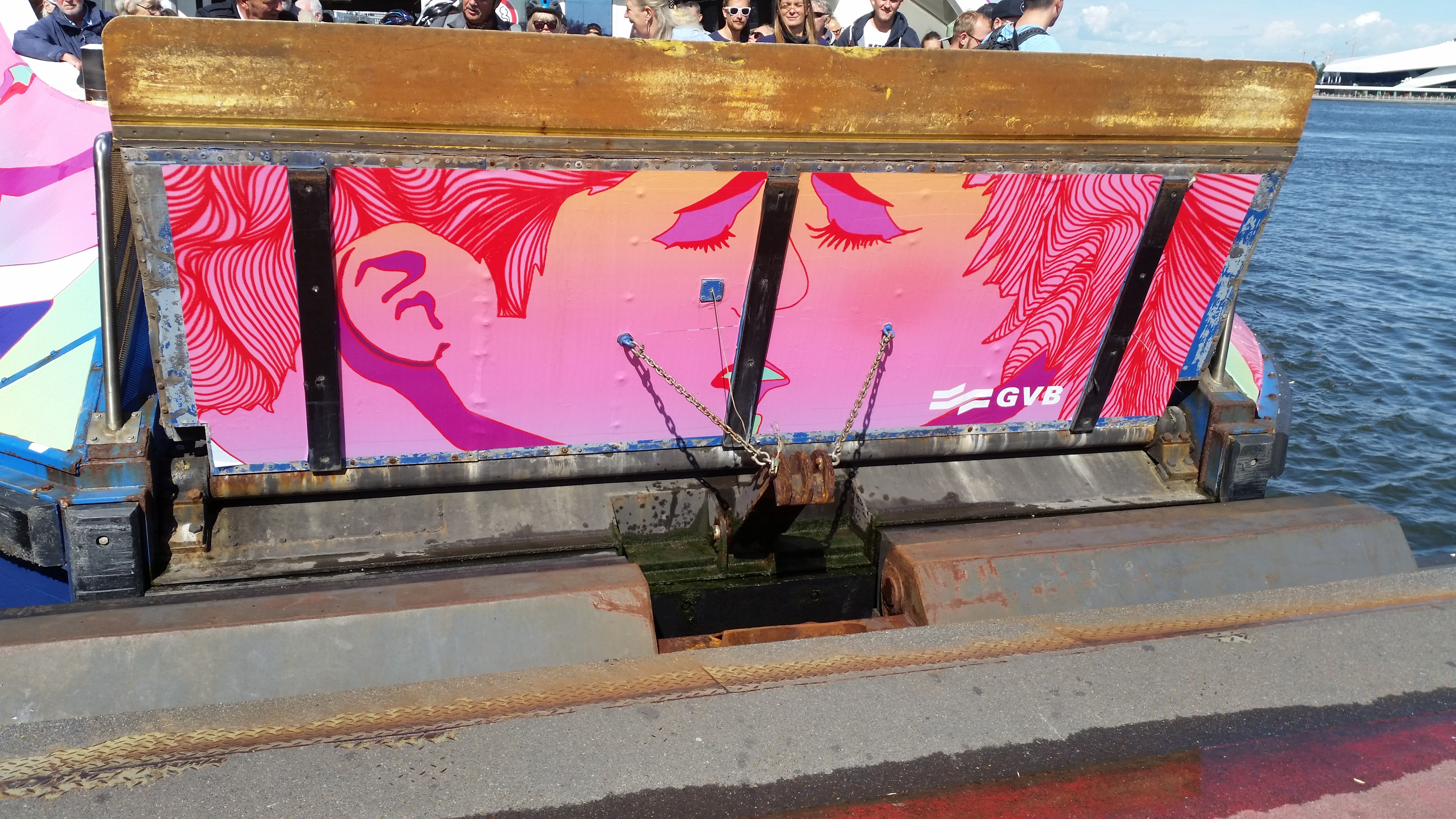 Pride, equality, love, laadklep